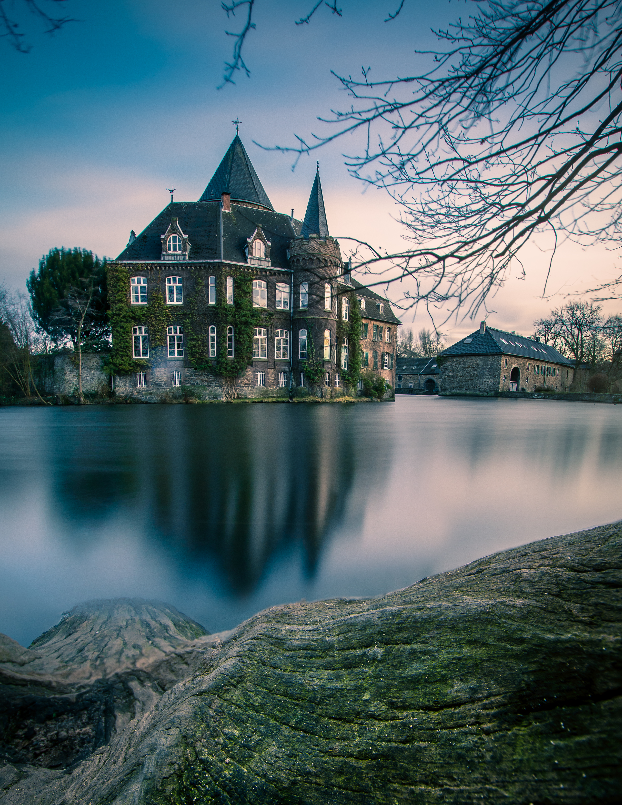 Dieses Foto habe ich vom wunderschönen Schloss in Ratingen,Germany aufgenommen. This is a photograph of an architectural monument., no. A 162